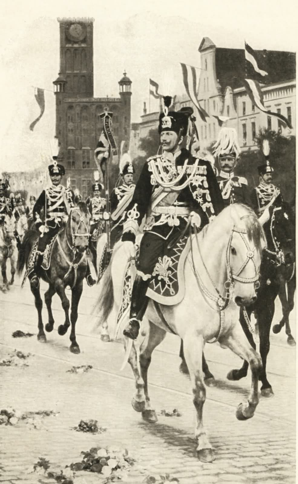 Nach Beendigung der Manöver bot sich am 15. September 1901 in Danzig ein besonderes militärisches Schauspiel. Das damals in Posen in Garnison stehende 2. Leibhusaren-Regiment Königin Viktoria von Preußen, das an den vorherigen Kaisermanövern teilgenommen hatte, wurde von Kaiser Wilhelm II. in der Atilla der 1. Leibhusaren vom jenseitigen Stadtende am Langgarter Tor in seine neue Garnison Danzig-Langfuhr eingeholt. Zur Seite des Kaisers ritt der damalige Oberst August von Mackensen als Kommandeur des 1. Leibhusaren-Regiments, das mit dem 2. Leibhusaren-Regiment zu einer Brigade vereinigt wurde.